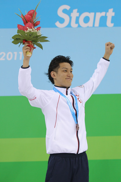 Mr.kosaka photo